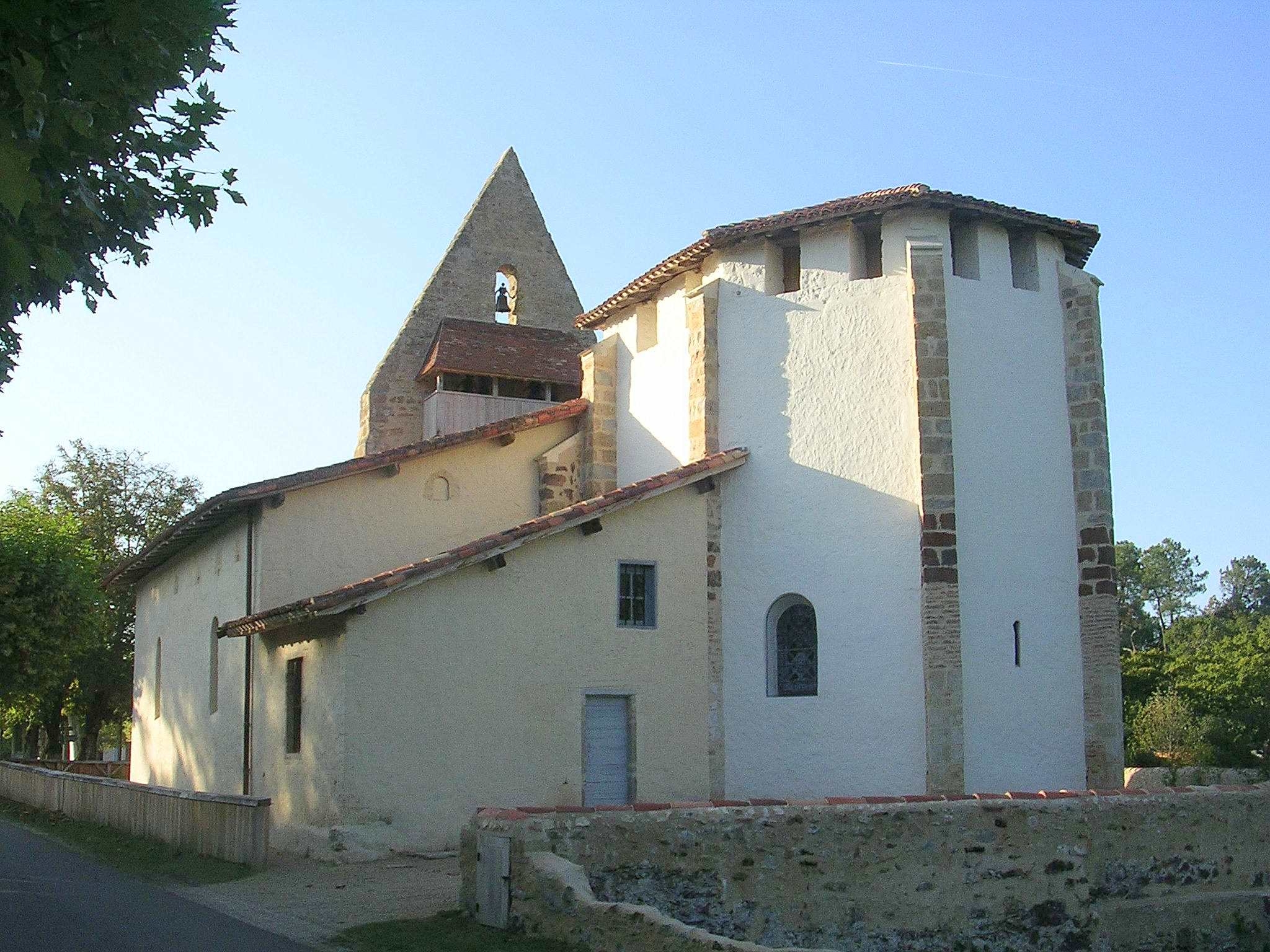 Église de Garein, dans le département français des Landes